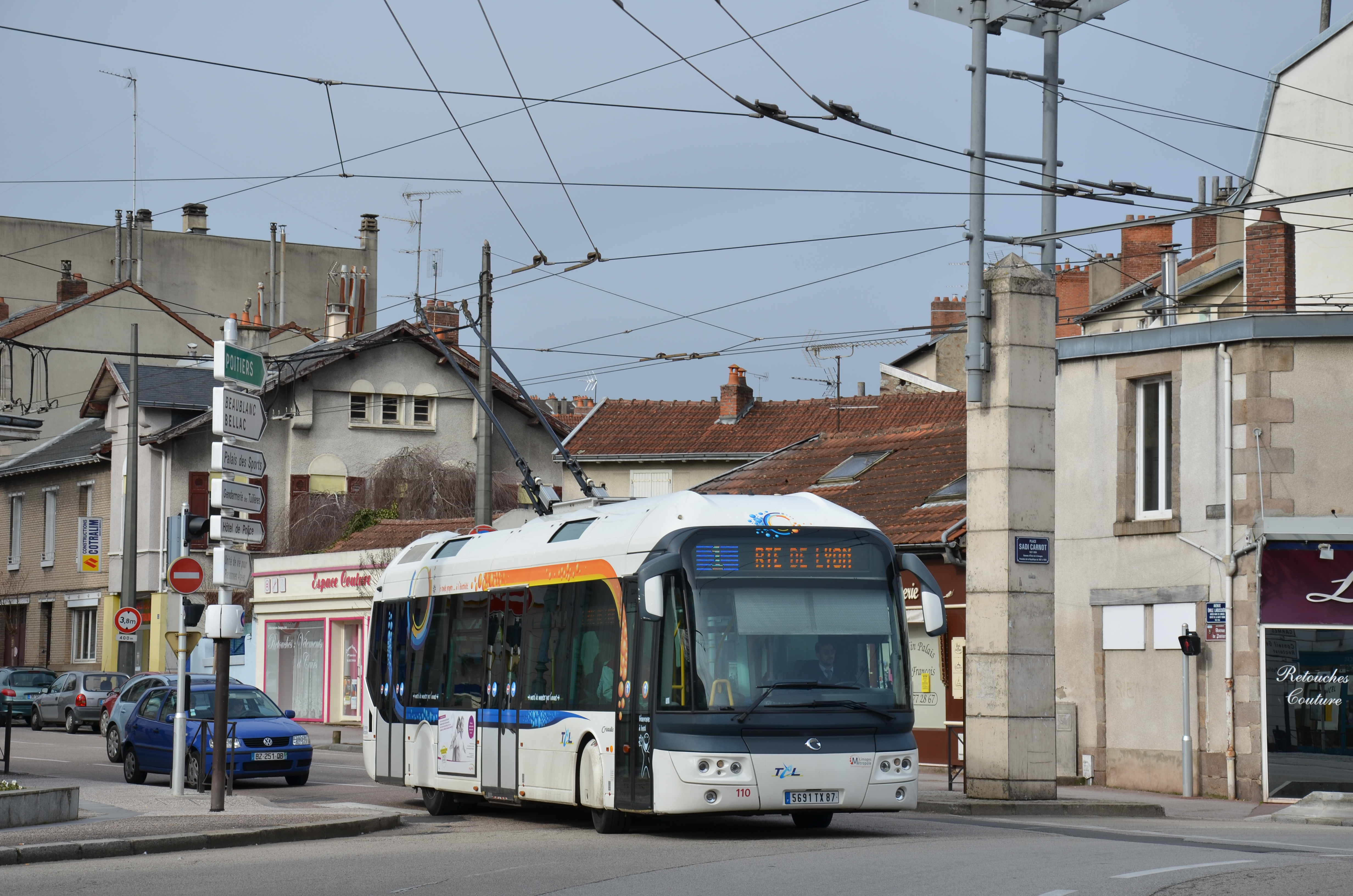 Irisbus Cristalis ETB 12 n°110 sur la ligne 1 du réseau TCL de Limoges, à Place Carnot.